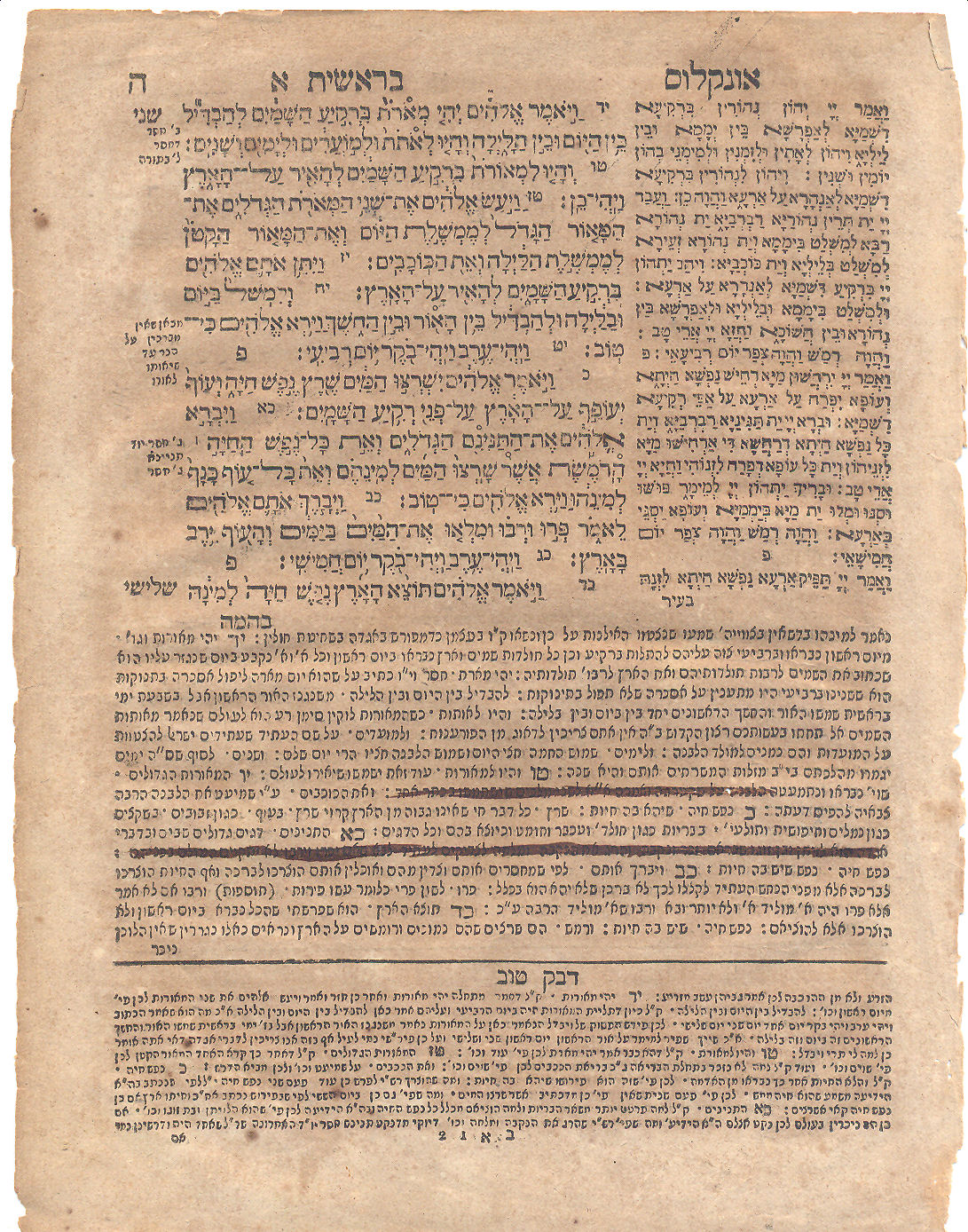 סריקה של חומש משנת 1749